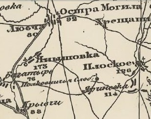 Полковнича Слобода с часовнею 1832 р.